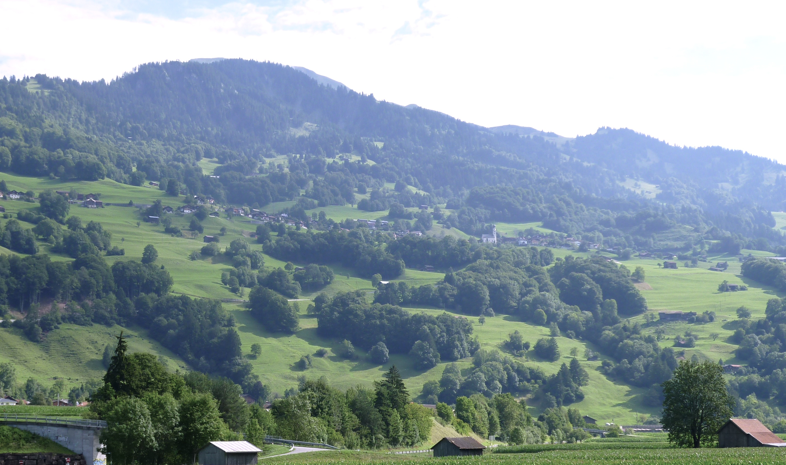 Fanas im Prättigau